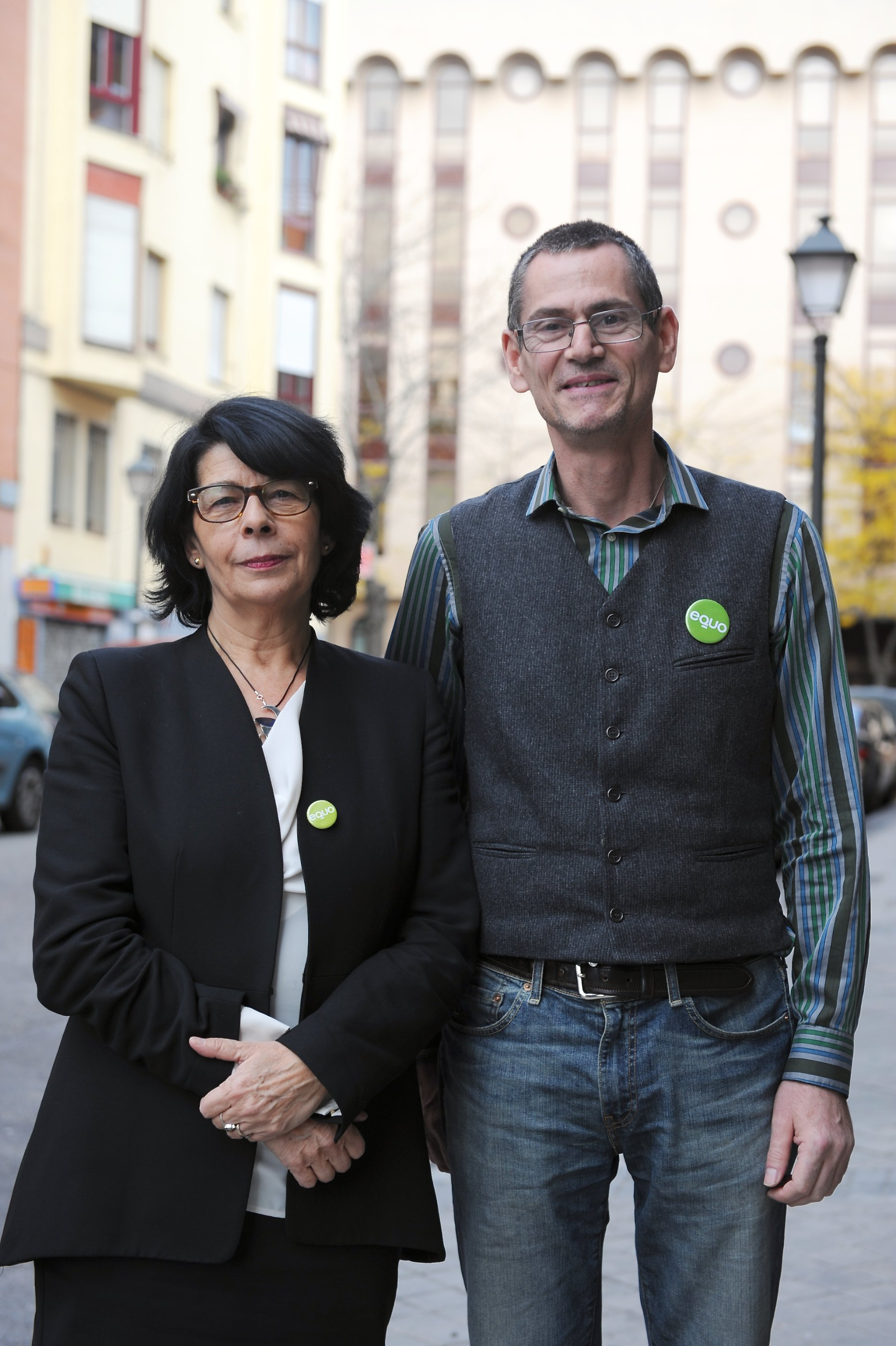 Los coportavoces de EQUO Madrid, Inés Sabanés y Ramón Linaza